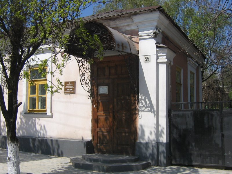 Маріпольський Музей народного побуту